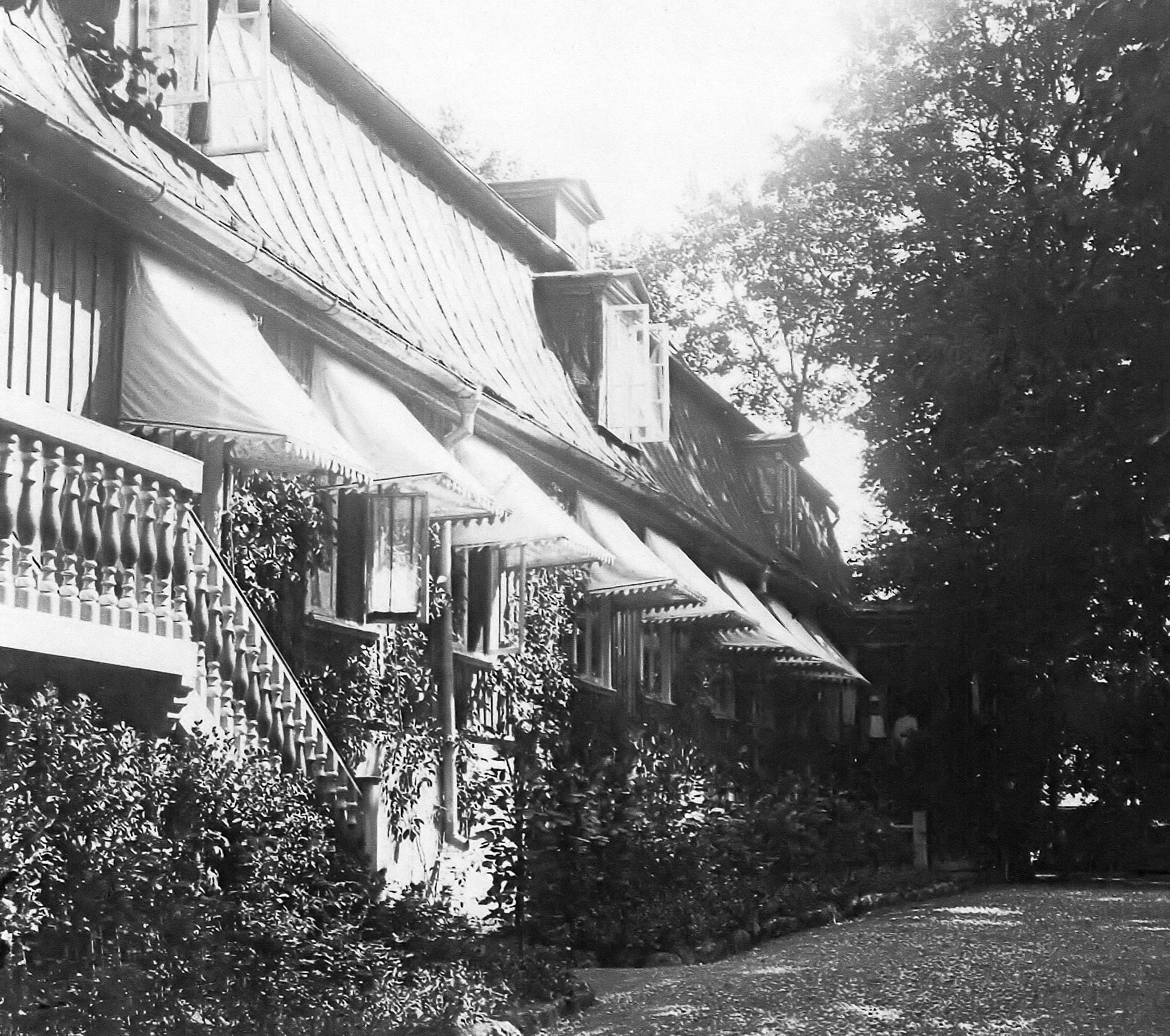 Vana-Varbla mõis